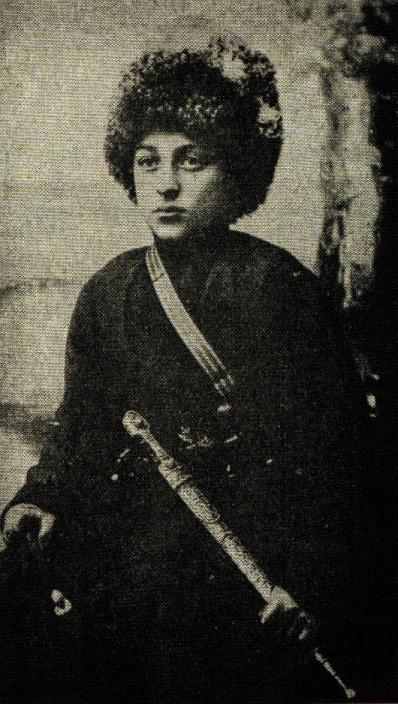 Абубакар Джургаев - чеченец, в возрасте 12 лет ушел на фронт добровольцем вместе со своим отцом Юсупом, оставив учебу в Грозненском реальном училище. Был активным участником всех знаменитых боев и сражений "Дикой Дивизии" в Первой мировой войне. В составе дивизии этот отчаянный мальчик неоднократно проявлял мужество и героизм. Узнав о нём командир «Дикой дивизии» князь Михаил Романов подарил предмет гордости каждого кавказца - кинжал, в то время ему было всего лишь 12 лет. В 14 лет Абубакар получил в награду почетную Георгиевскую ленту, перевязанную ему лично князем Романовым.